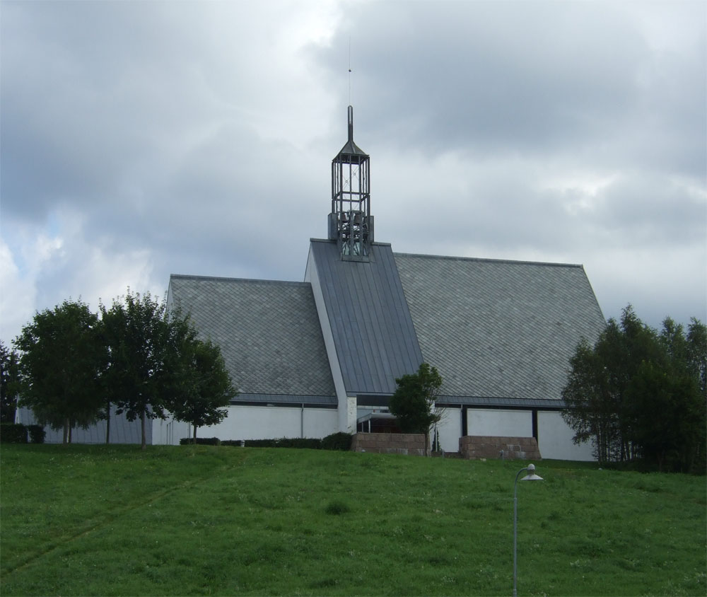 Lommedalen kirke (Lommedalen church)